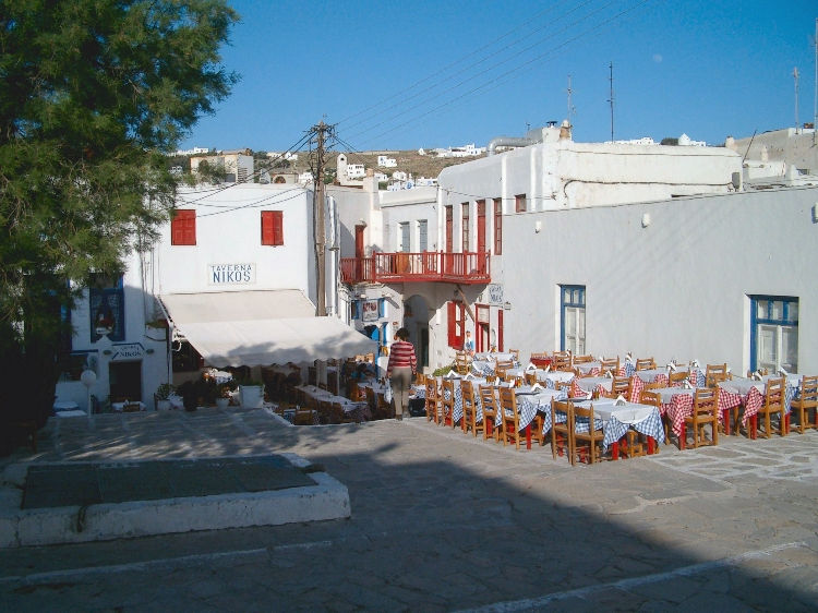 Plaz zu Mykonos.